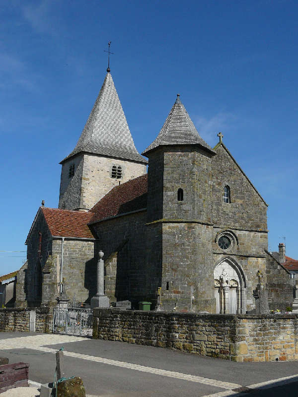 L'église de la Translation de Saint-Martin à Urville (Vosges)